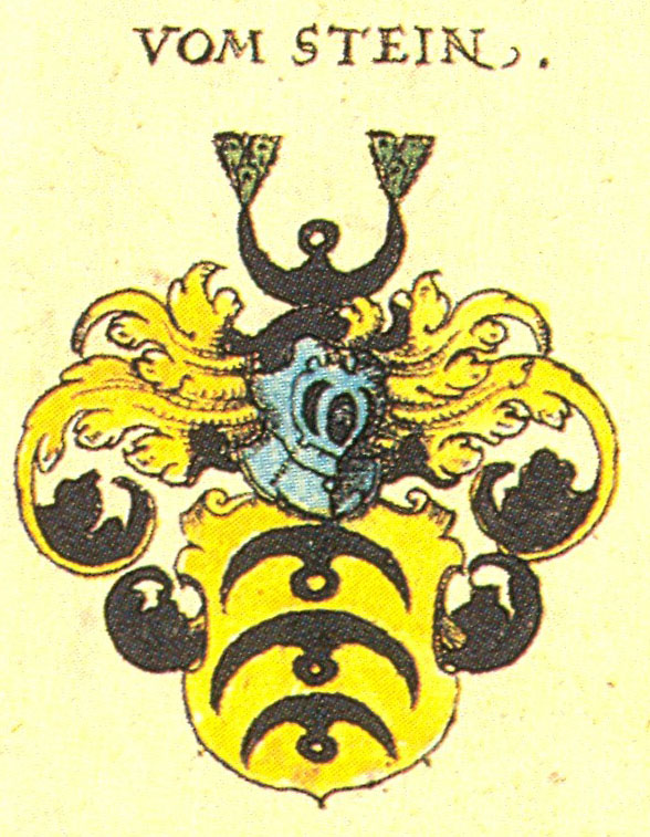 Ritterschaft und Adel in Schwaben, von Stein